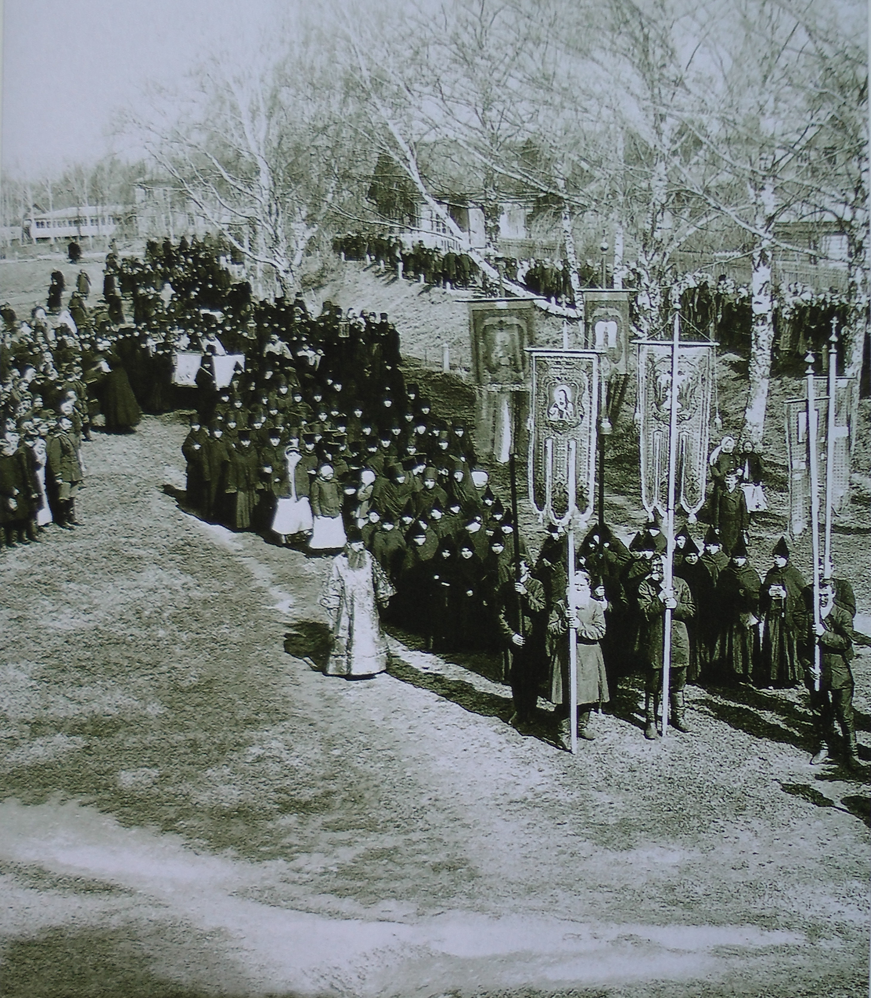 Неизвестный фотограф из Нижнего Новгорода. Крестный ход по святой Канавке.